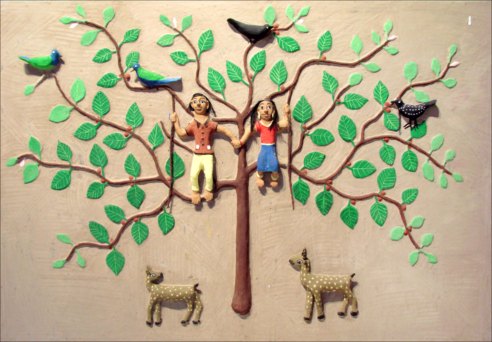 Sundaribai District de Sarguja, Etat de Chhattisgarh Panneaux avec silhouettes décoratives Argile crue, couleurs coco et minérales 2009 oeuvres réalisées pour l'exposition Image de l'exposition "Autres Maîtres de l'Inde, créations contemporaines des Adivasi " Musée du Quai Branly Paris